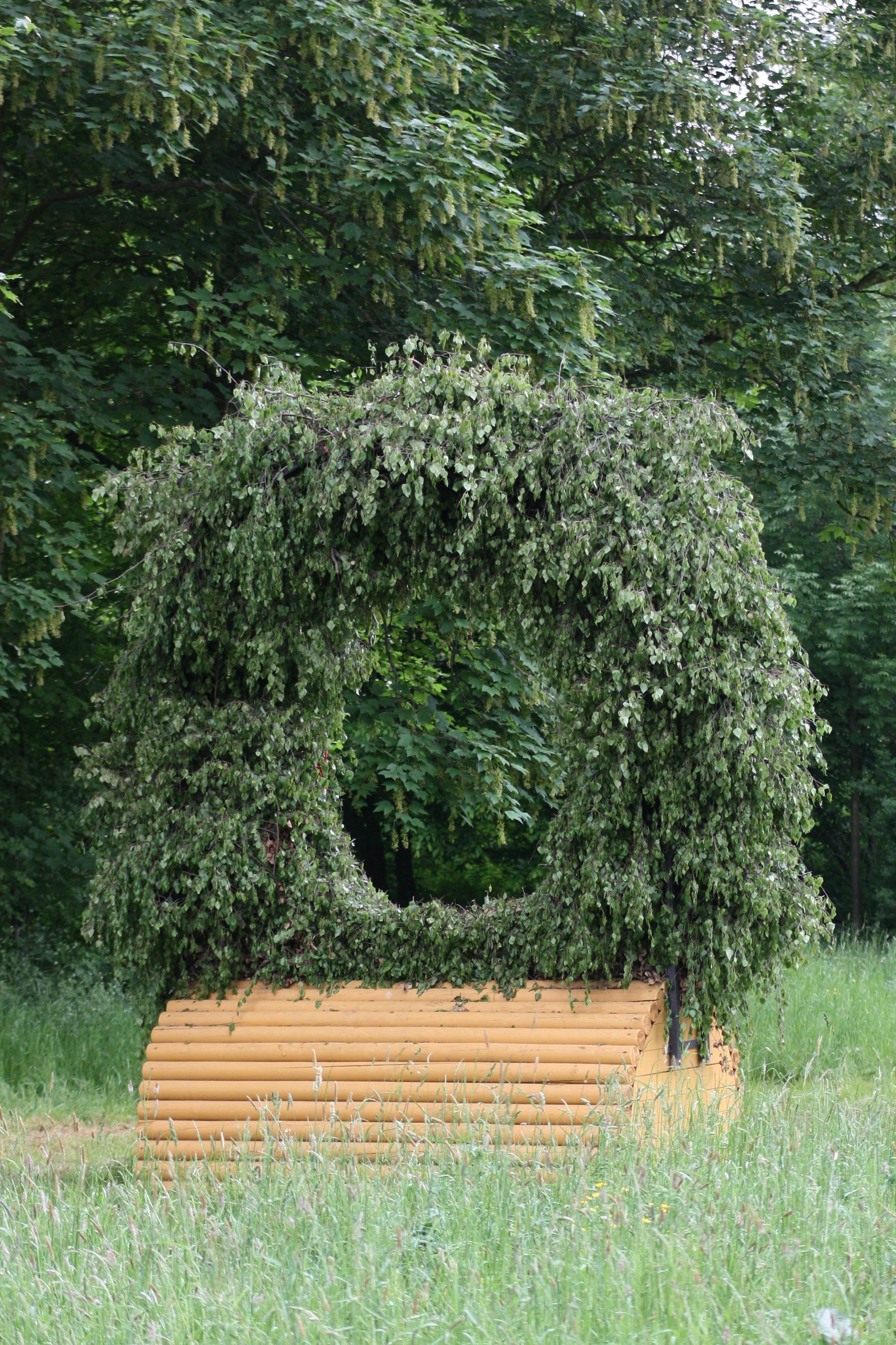 77. Internationales Pfingstturnier Wiesbaden 2013, CIC *** Vielseitigkeit Geländeprüfung, Geländehindernis The making of this document was supported by the Community-Budget of Wikimedia Germany.